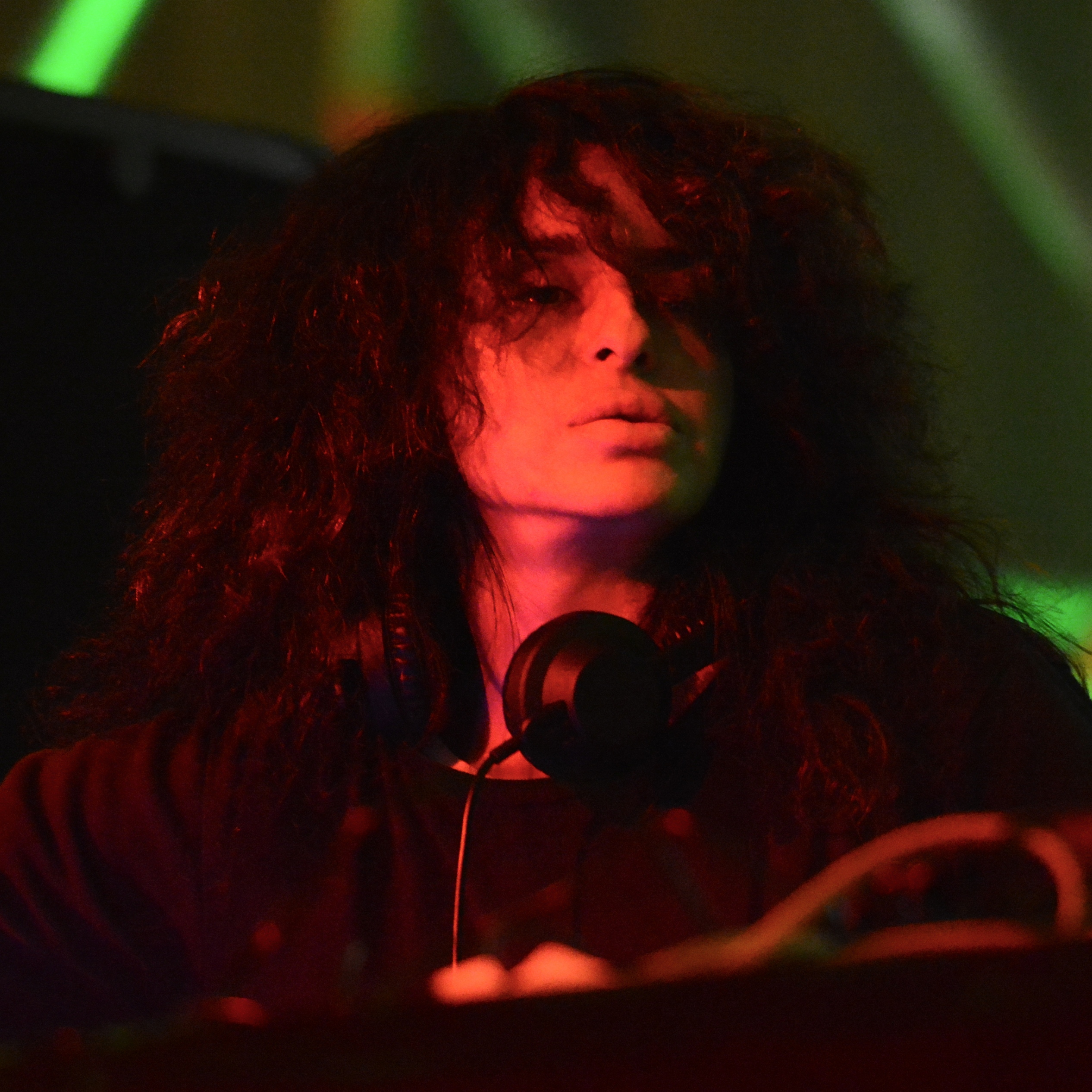 Nicole Moudaber bei Mayday 2014.